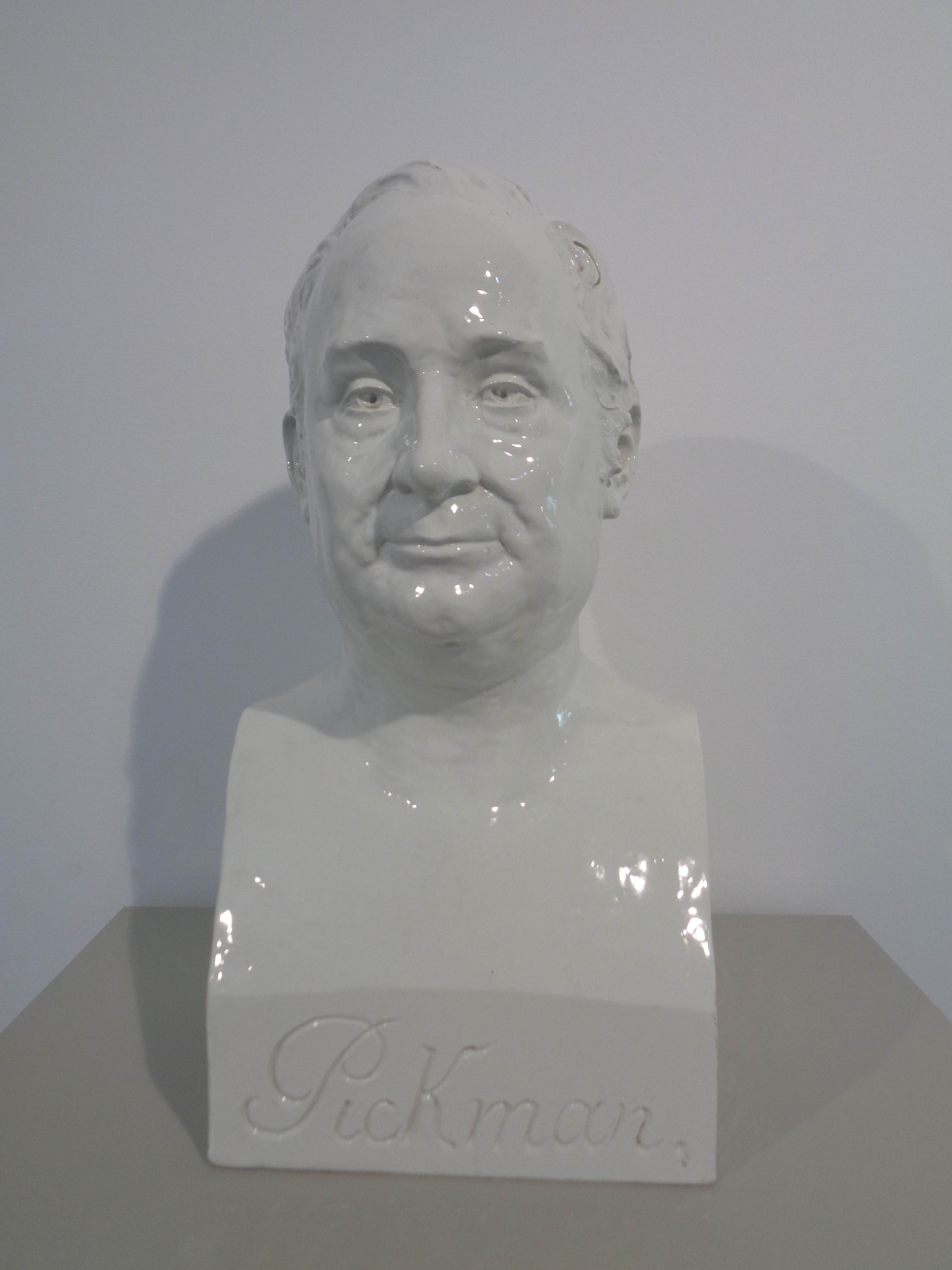 Busto del I Marqués de Pickman en el Centro Cerámica Triana. Realizado por Antonio Susillo en 1885 y procede de los fondos del Museo Nacional de Artes Decorativas de Madrid